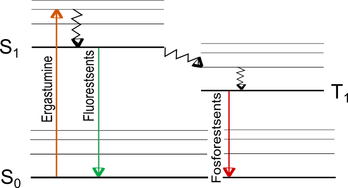 Energiatasemete üleminekud Jablonski diagrammil